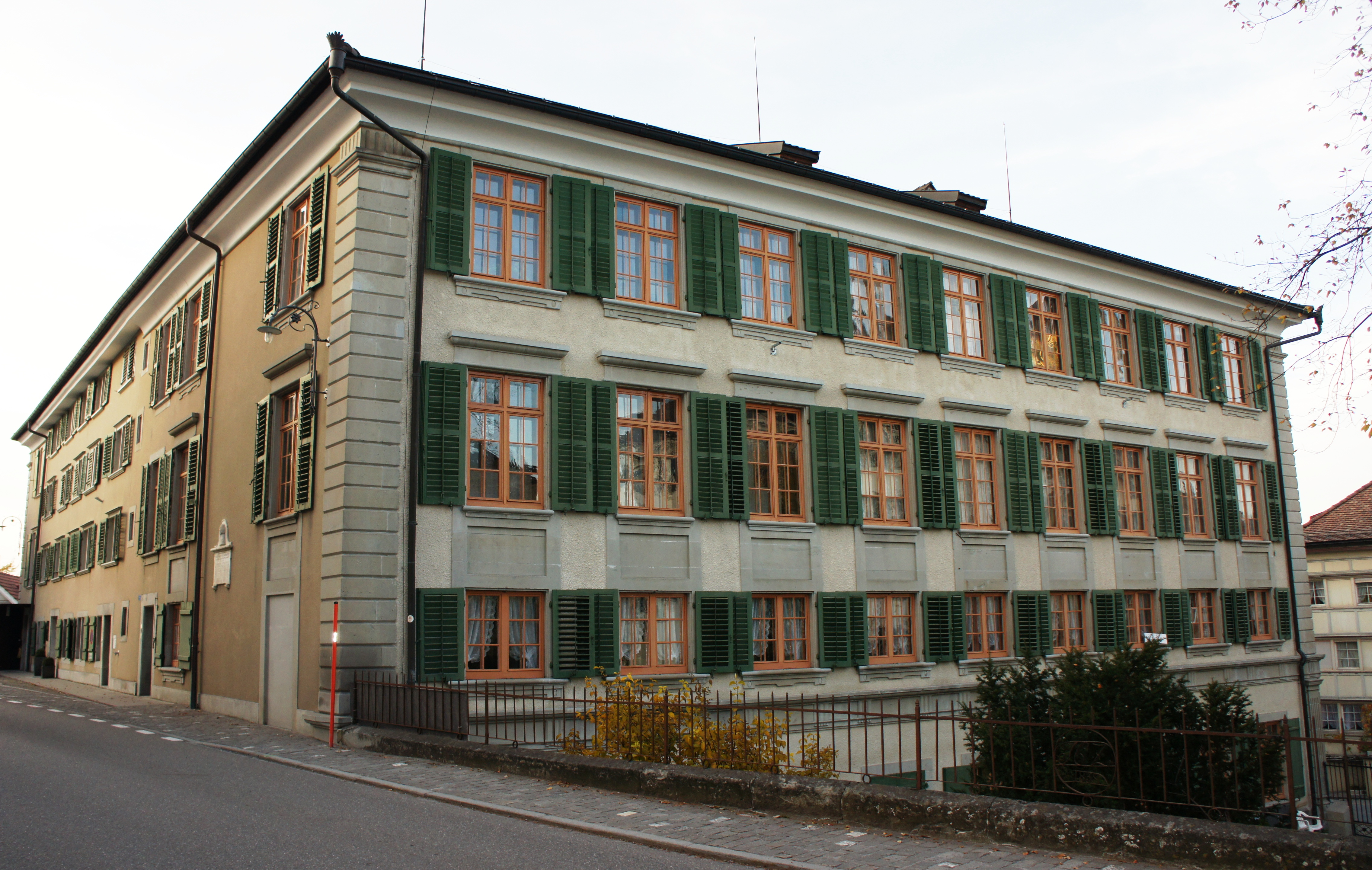 Blick aus Süden auf den Fünfeckpalast am Landsgemeindeplatz 7 in Trogen. Der Palast hat vier Stockwerke, wobei die Fenster des ersten Obergeschosses etwas weniger hoch sind. Das Gebäude hat Satteldächer und einen Innenhof, der aber nur bei Luftaufnahmen sichtbar ist. Das Erdgeschoss ist auf dieser Seite nur teilweise sichtbar infolge Hanglage. Links ist die längste der fünf Seiten des Palastes. Im mittleren Teil dieser Fassade sind die Stockwerke weniger hoch und somit leicht versetzt. Im vorderen Teil ist eine weisse Gedenktafel für JOHANN CASPAR ZELLWEGER zu erkennen. Rechts im Vordergrund ist ein umzäunter Garten zu sehen.